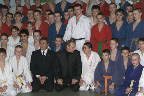 МОСКВА. Посещение образовательного центра «Самбо-70». С директором центра Ренатом Лайшевым и воспитанниками центра.